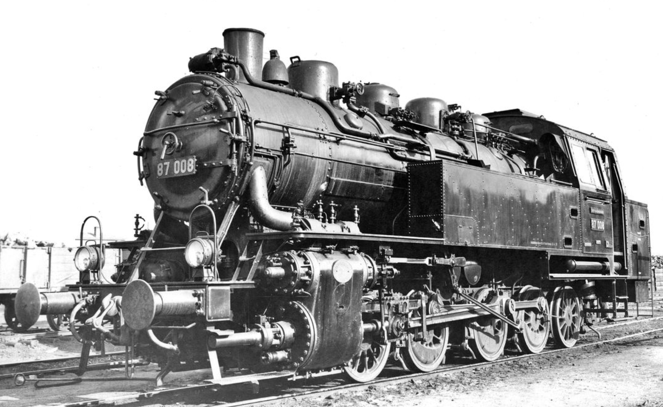 Dampflokomotive der DR-Baureihe 87 (87 008, Baujahr 1928, ausgemustert 1954) in Hamburg-Wilhelmsburg